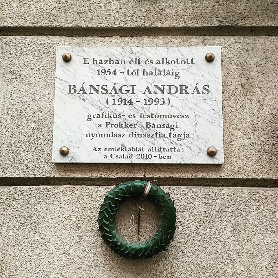 Bánsági András grafikus- és festőművész emléktáblája Budapest IX. kerületében, a Sobieski János utca 40. szám alatt